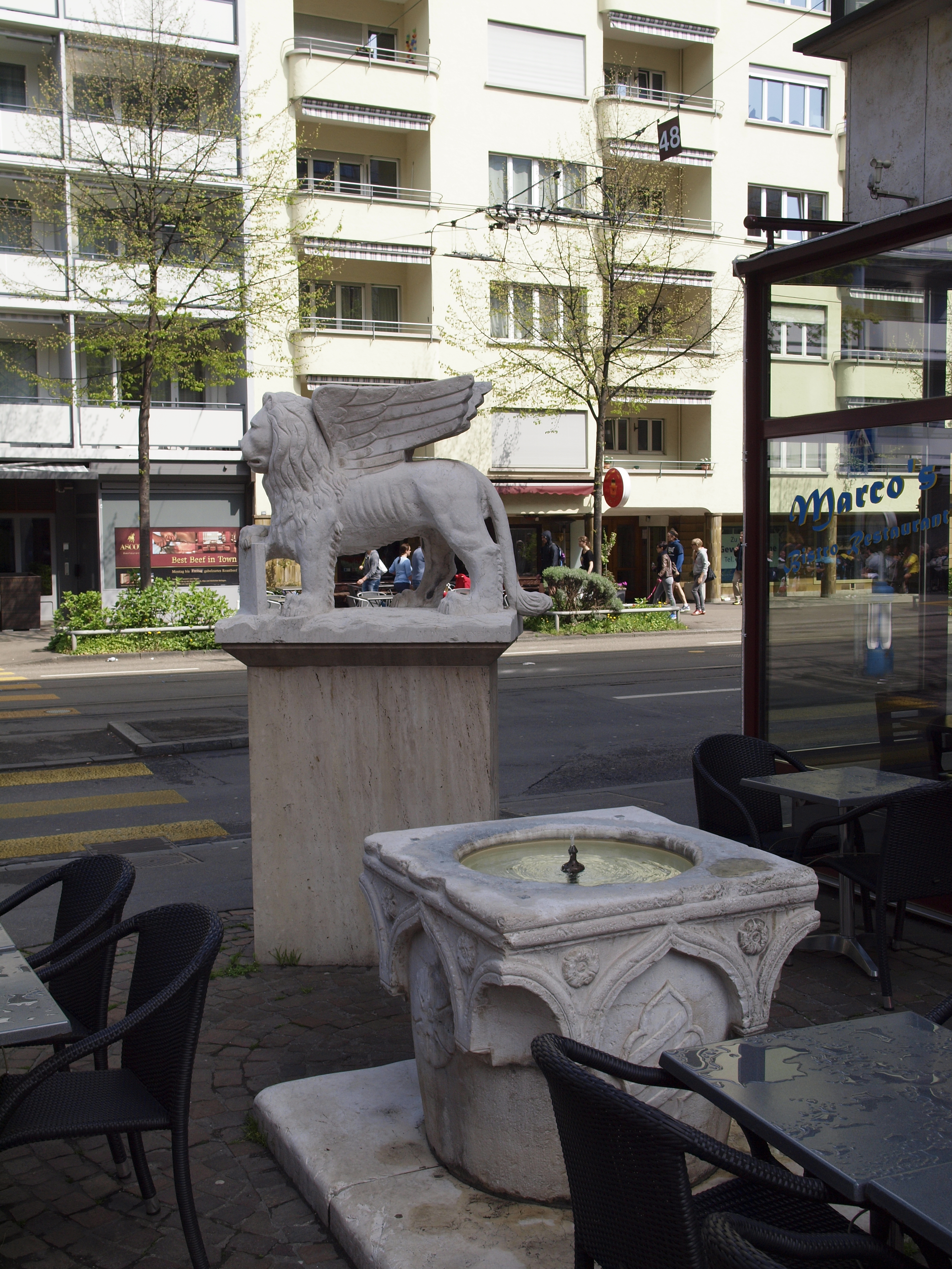 Der Venedigbrunnen in Zürich Enge